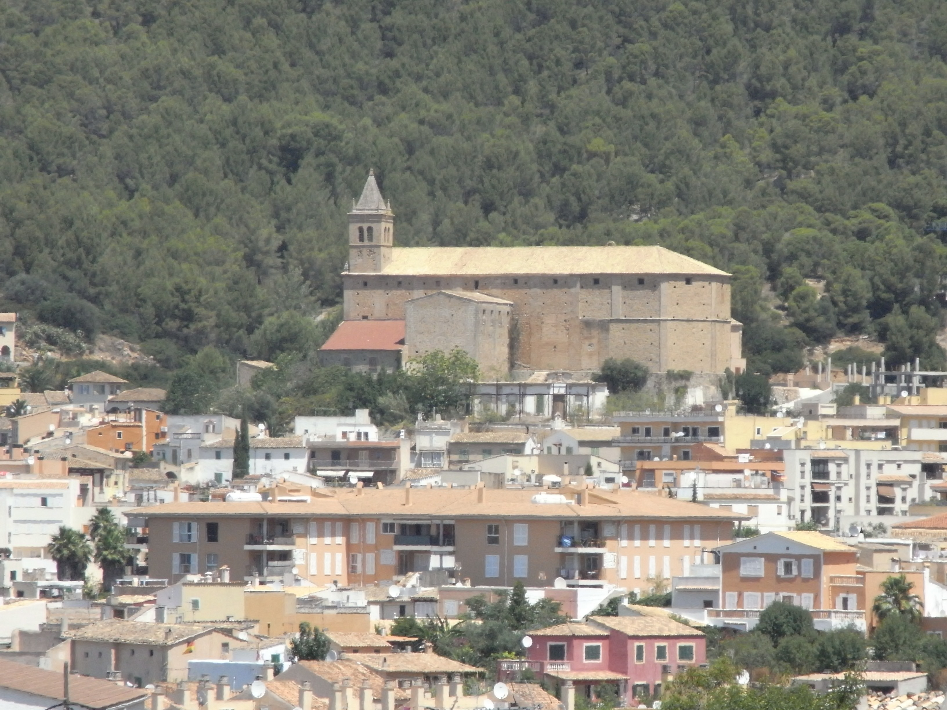 Andratx, kristana preĝejo de S-ta Maria